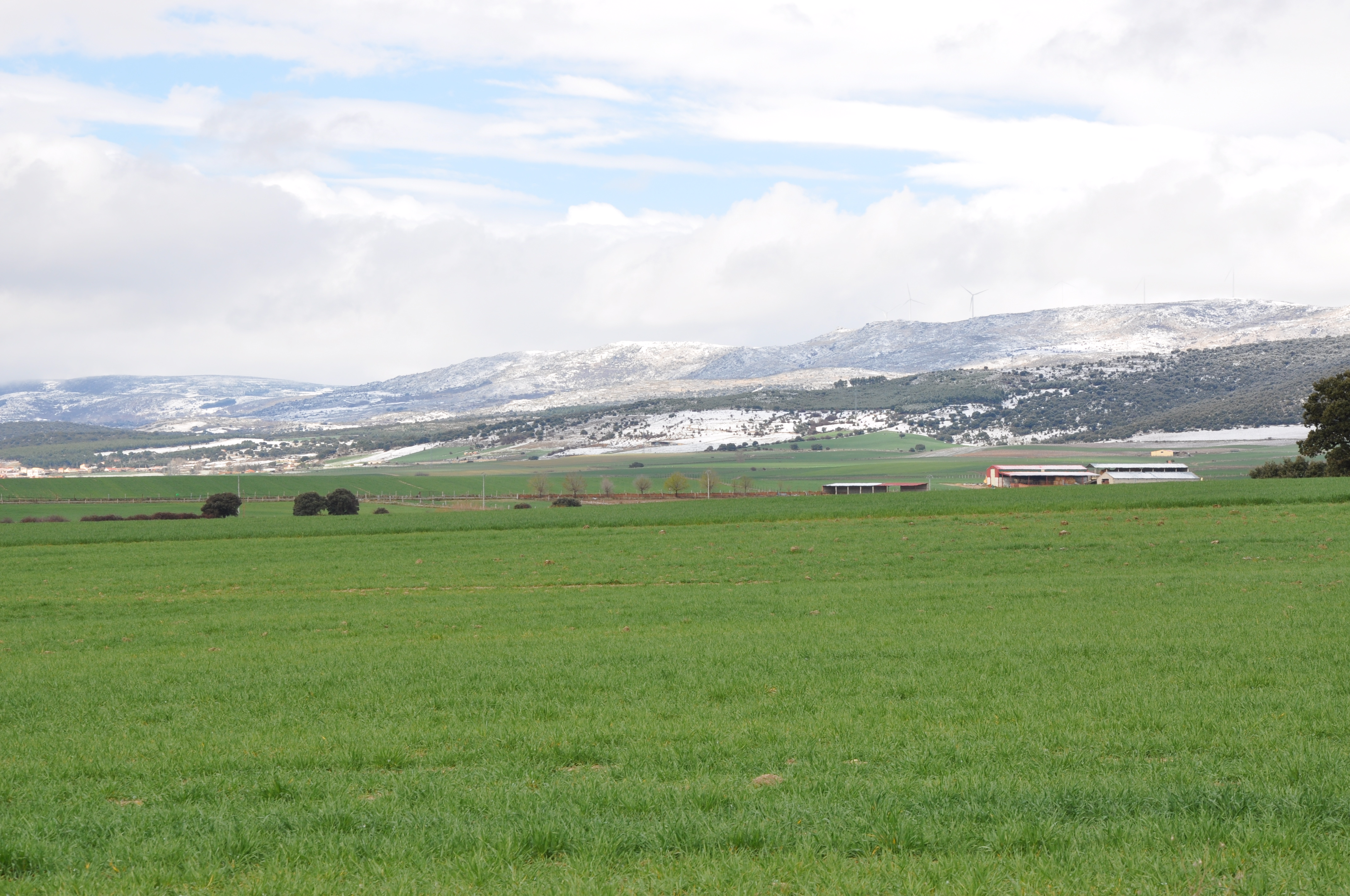 Campos de cebada en el Valle de Amblés, Ávila, España.